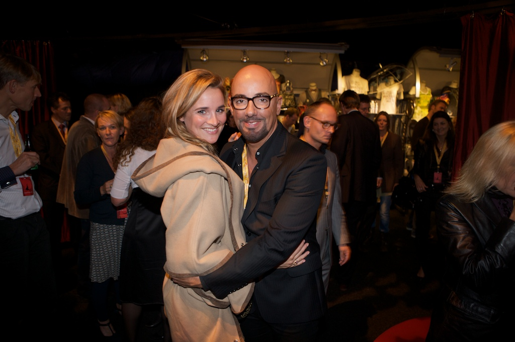 Lieke van Lexmond en Maik de Boer bij de Europese première Cirque du Soleil in Amsterdam